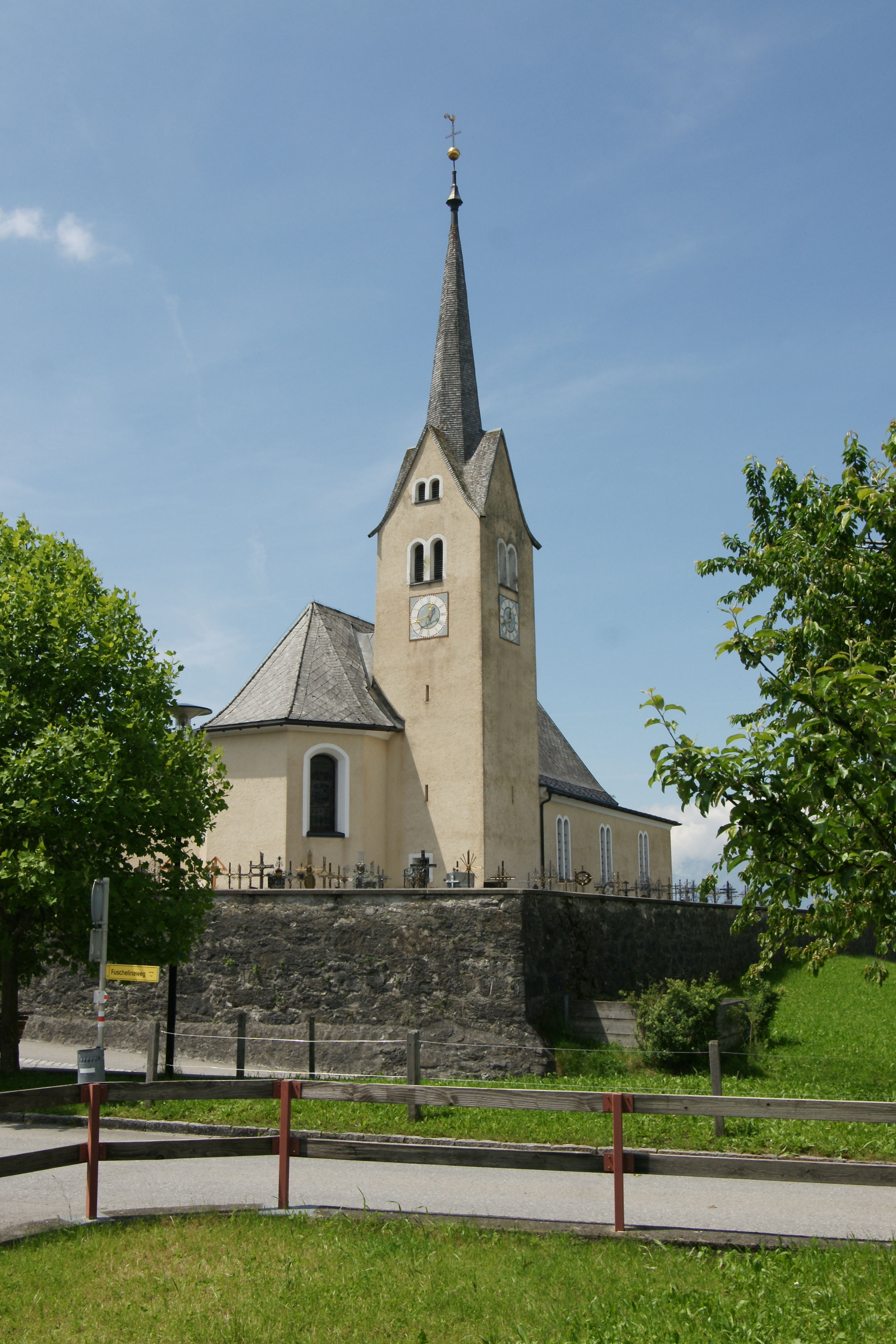 Pfarrkirche "Hl. Batholomäus" in Übersaxen.